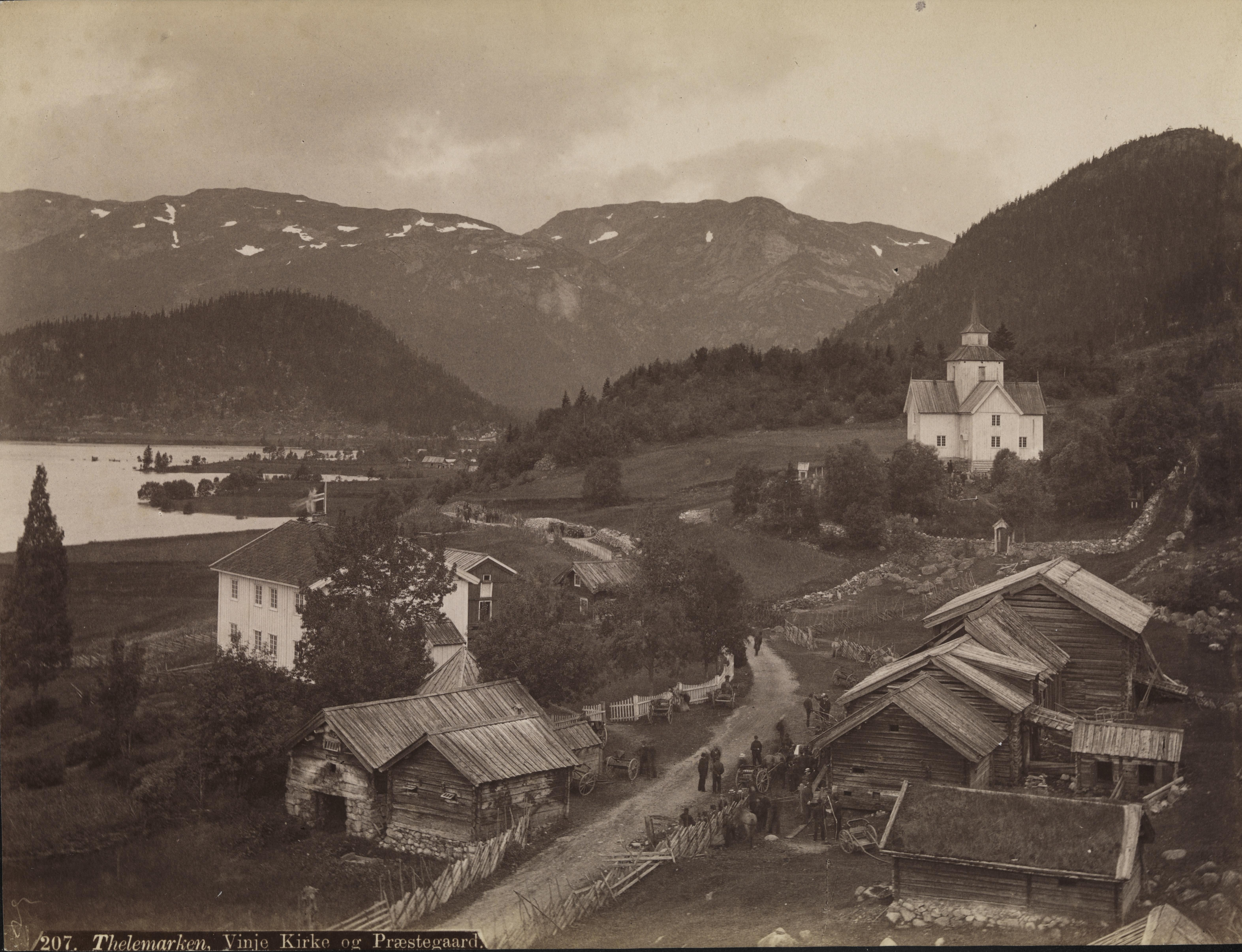 Thelemarken, Vinje Kirke og Præstegaard Sted: Kommune: Fylke: Tagger: gårder kirker landskapsfotografi